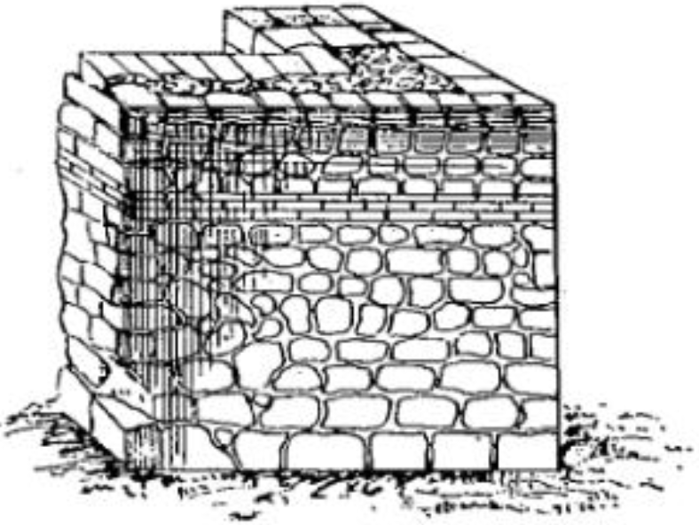 Opus incertum, mur romain antique formé de maçonnerie à parements formés de moellons polygonaux, raccordés à lits et joints perdus